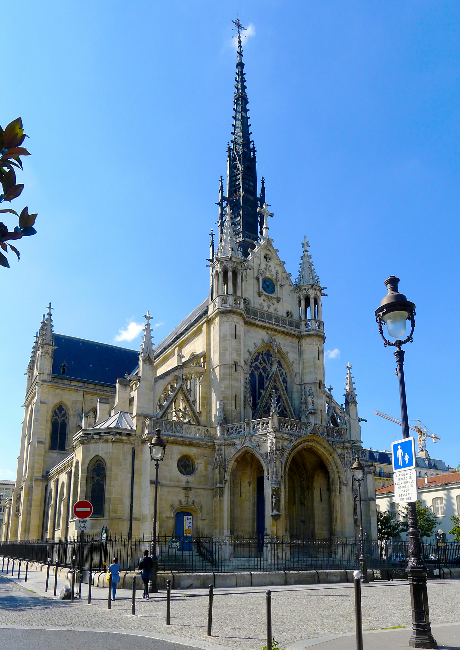 Église Saint-Bernard de la Chapelle - Paris XVIII